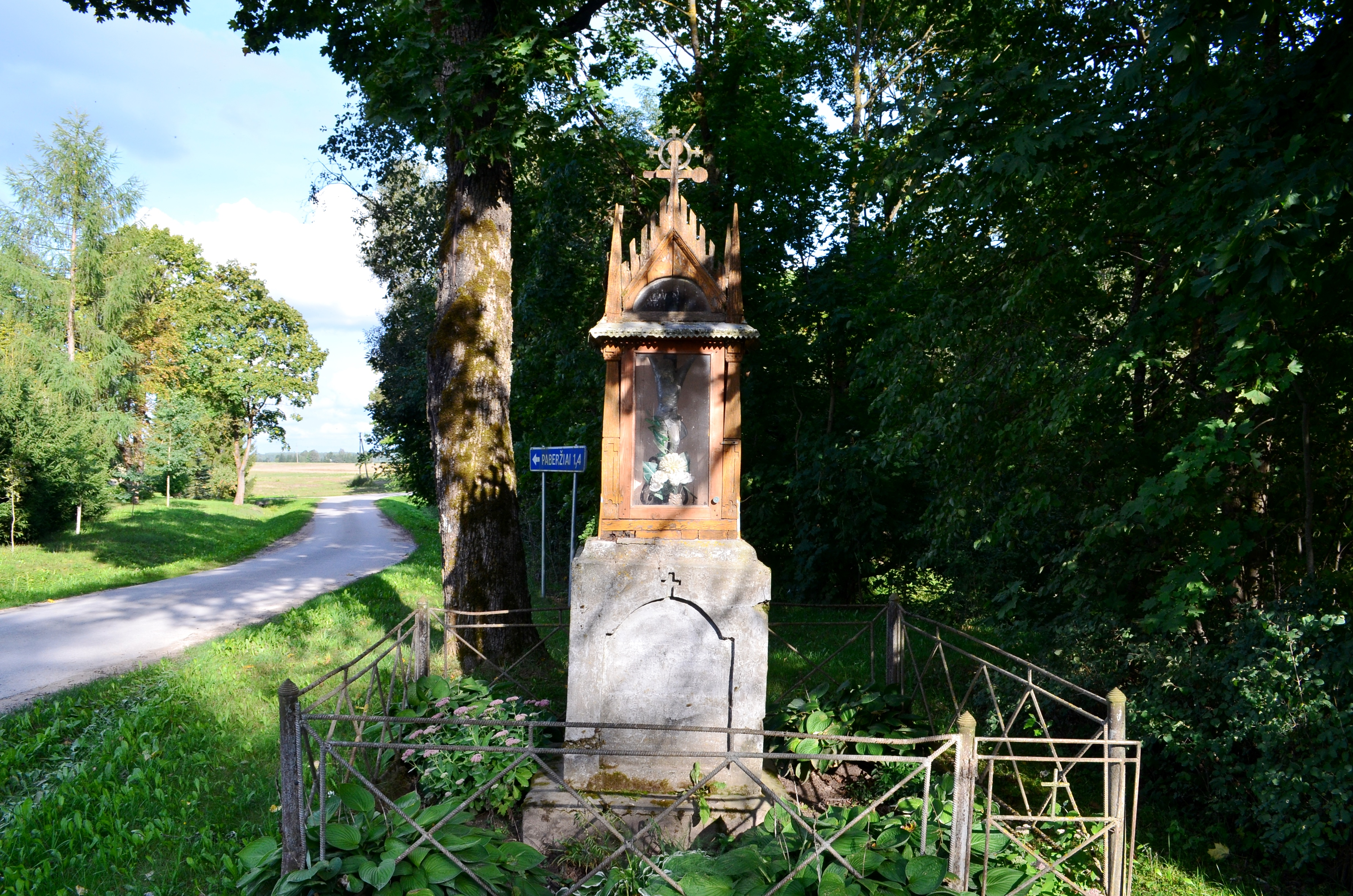 Koplytėlė Čerkosų k., Radviliškio raj.